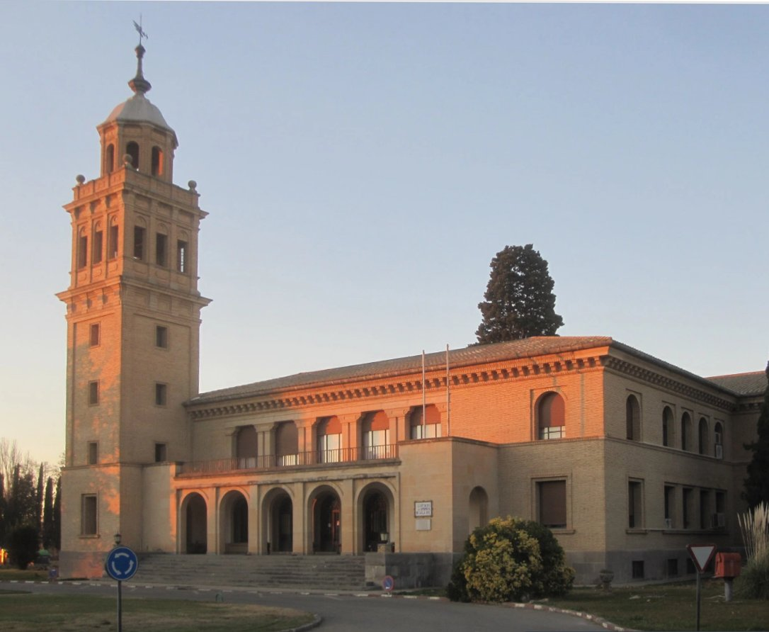 Edificio principal de la Estación Experimental Aula Dei (CSIC)